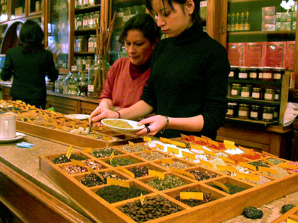 El Gato Negro (Corrientes 1669, barrio San Nicolás, Buenos Aires) es un bar donde se puede disfrutar de gran variedad de estilos de infusiones un lugar con más de 70 años de historia. Es una de las especierías más antigua de la ciudad de Buenos Aires. Tiene un amplio salón en el primer piso. También hay shows de tango, jazz y música melódica.gato negro